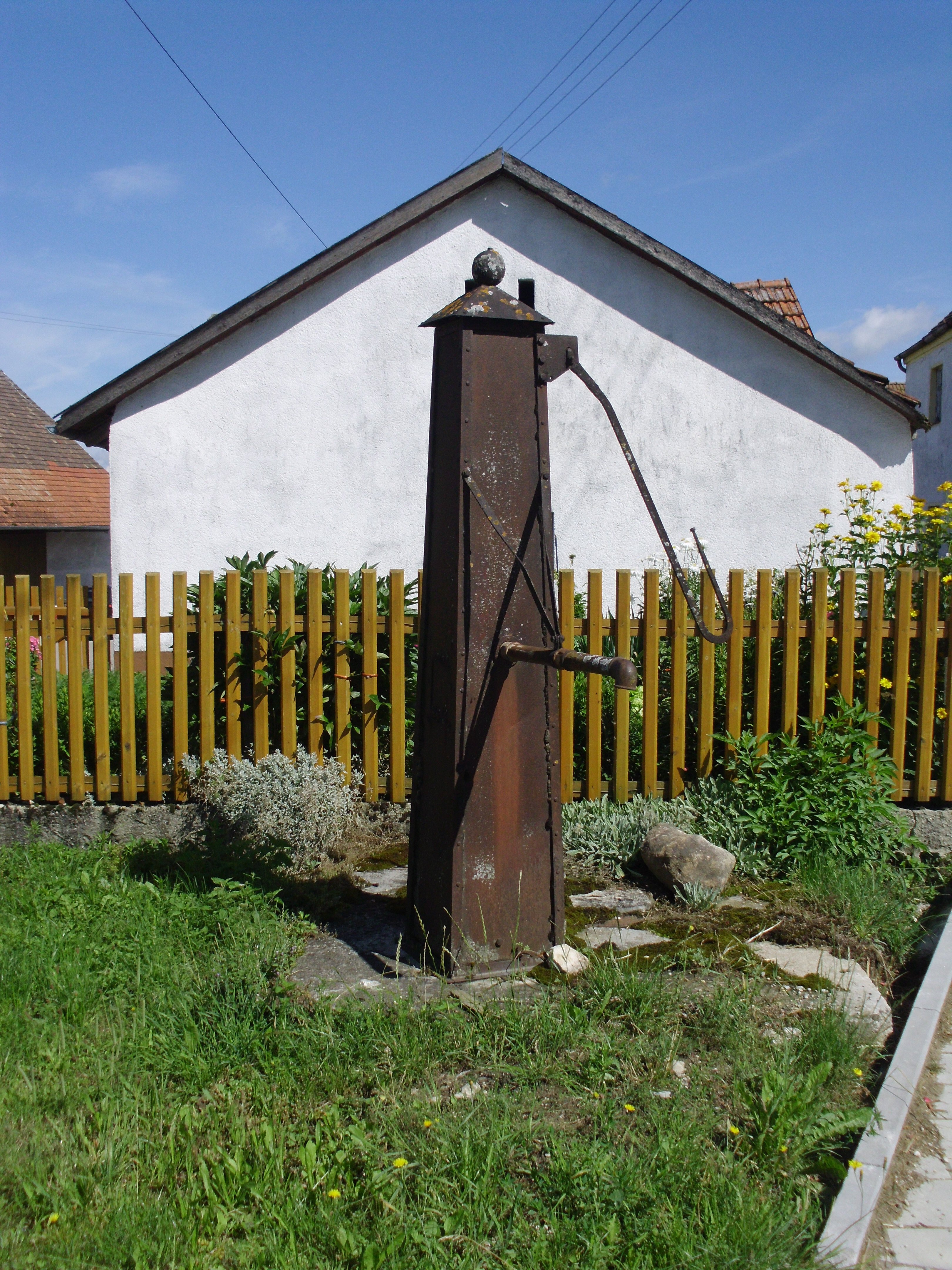 Asbrunn, Gemeindeteil von Rennertshofen im Landkreis Neuburg-Schrobenhausen, ehemaliger Dorfbrunnen